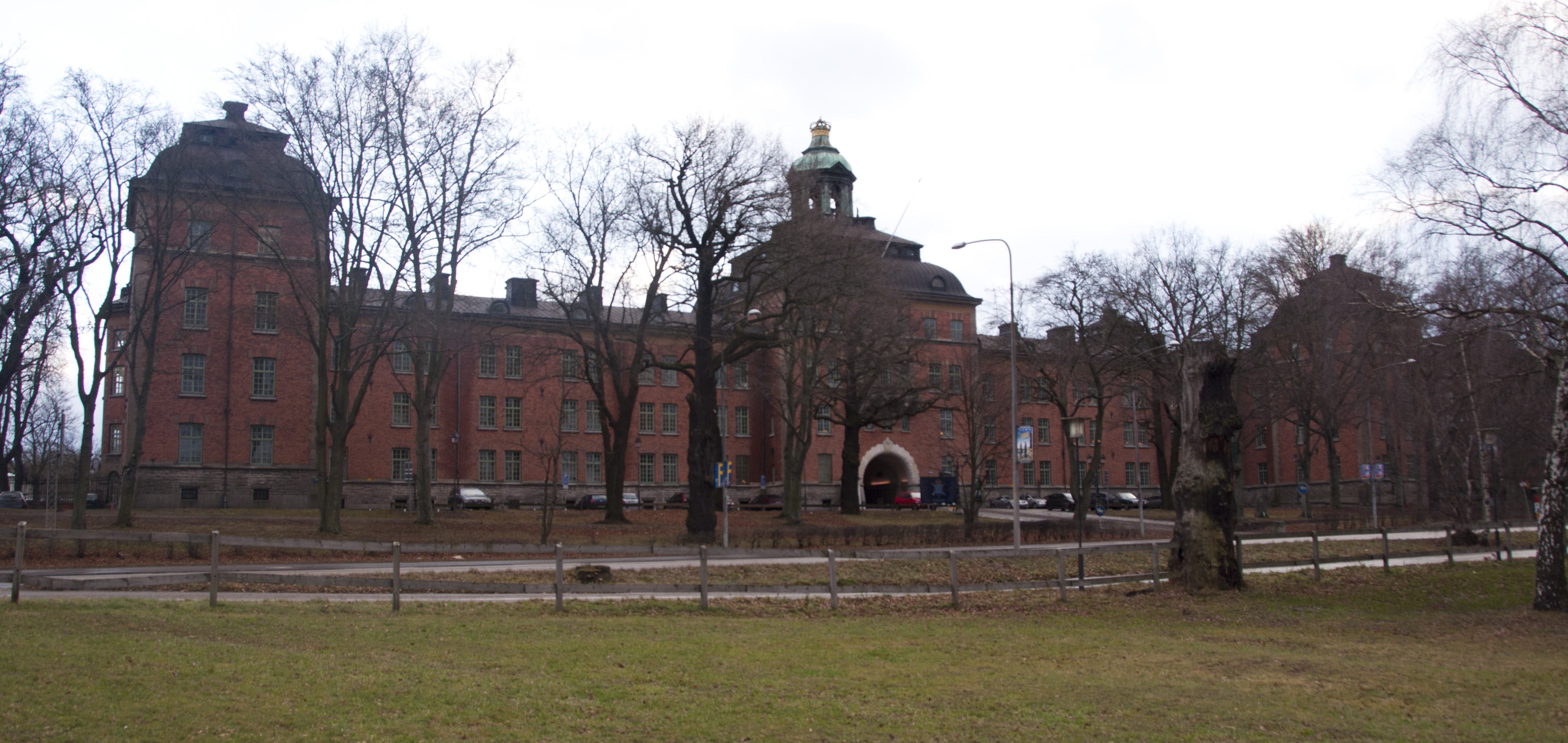 Lidingövägen 28, K1. Byggnadsår 1897. Arkitekt Erik Josephson